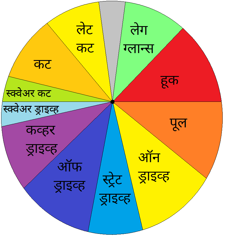 क्रिकेटमध्ये फलंदाजाने मैदानात विविध ठिकाणी मारलेल्या फटक्यांची नावे